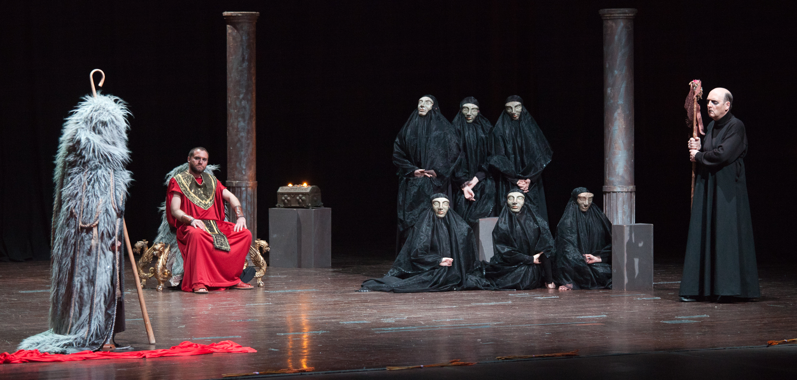 Représentation d'"Oedipe Roi" de Sophocle au "Festival de teatro grecolatino de Lugo" (Galice - Espagne), en 2011.